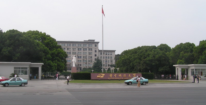 2005年7月juansheng拍摄于武汉华中科技大学门口。